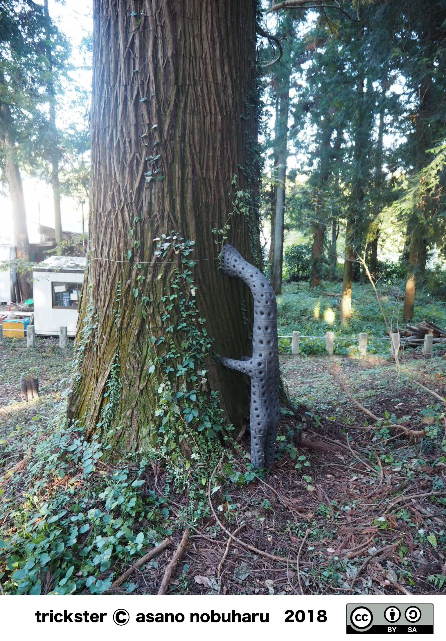 トリックスター作品展示の様子